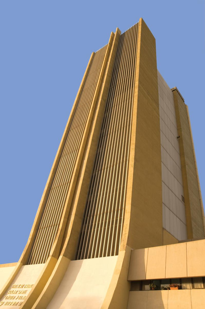 המכון הקנדי